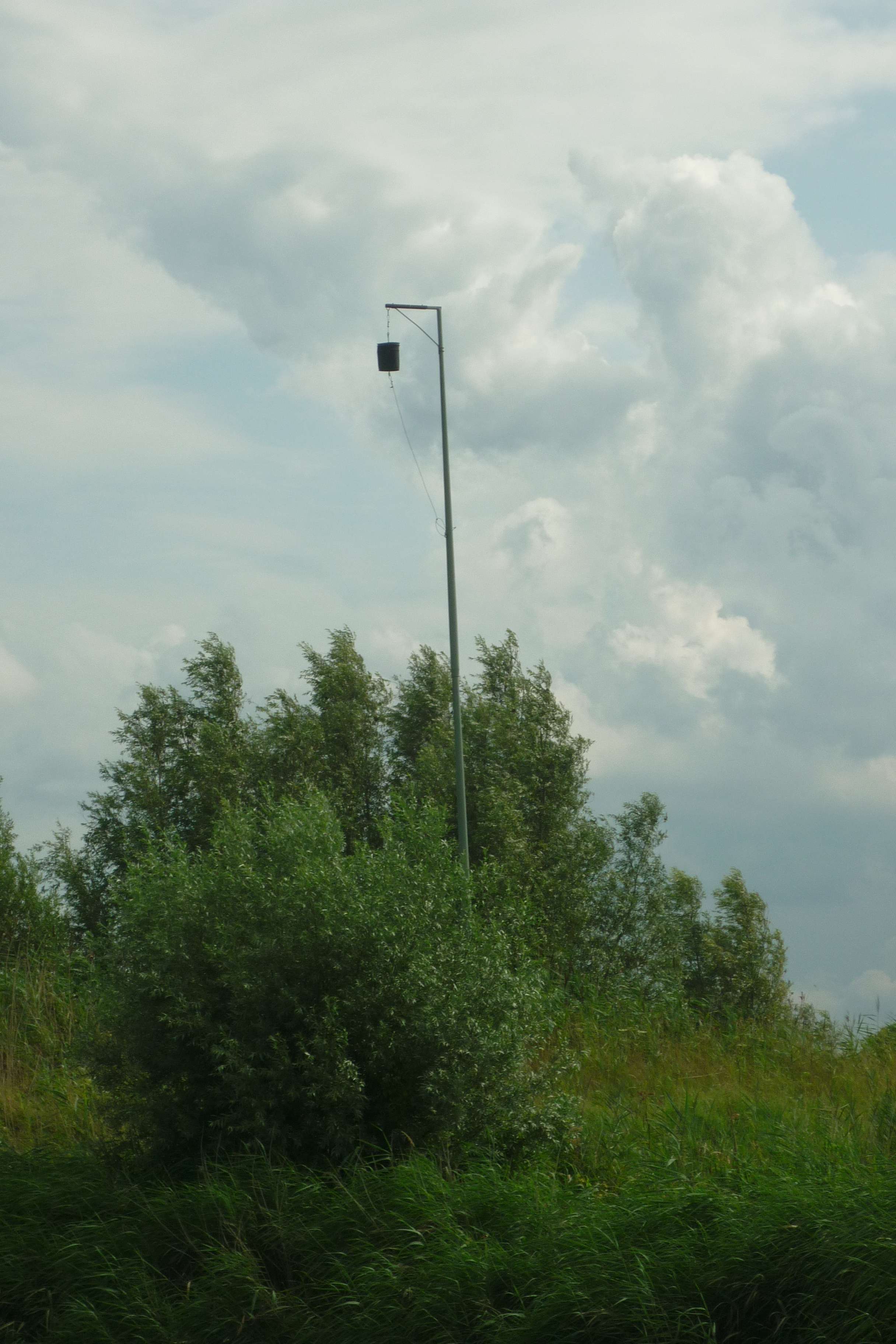 Mandje aan de oever tegenover Drimmelen, door line-crossers gebruikt